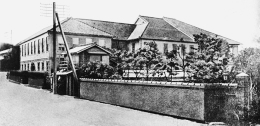 法政大学 九段上校舎